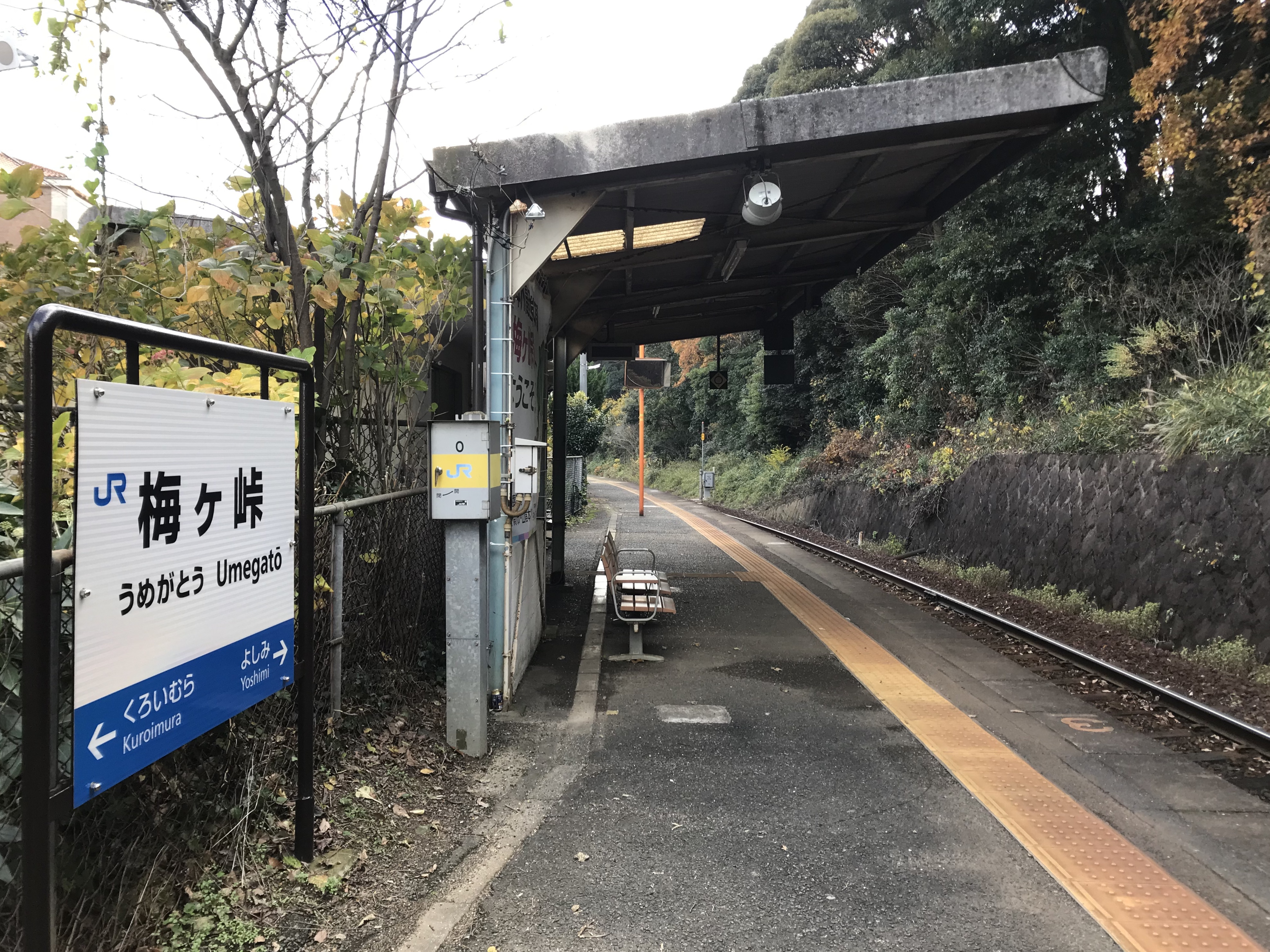 梅ヶ峠駅のホーム(奥は吉見方面)